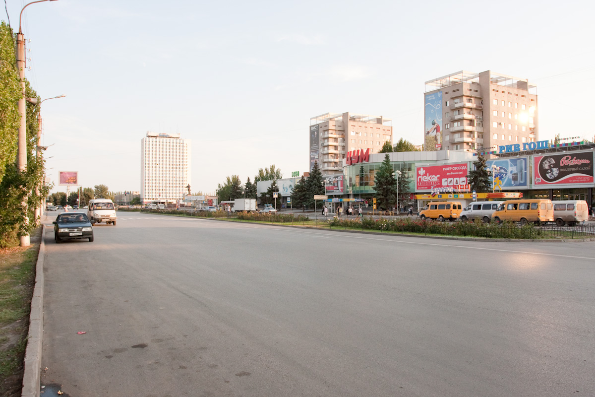 г.Волжский, Волгоградская обл., центр города, проспект Ленина.